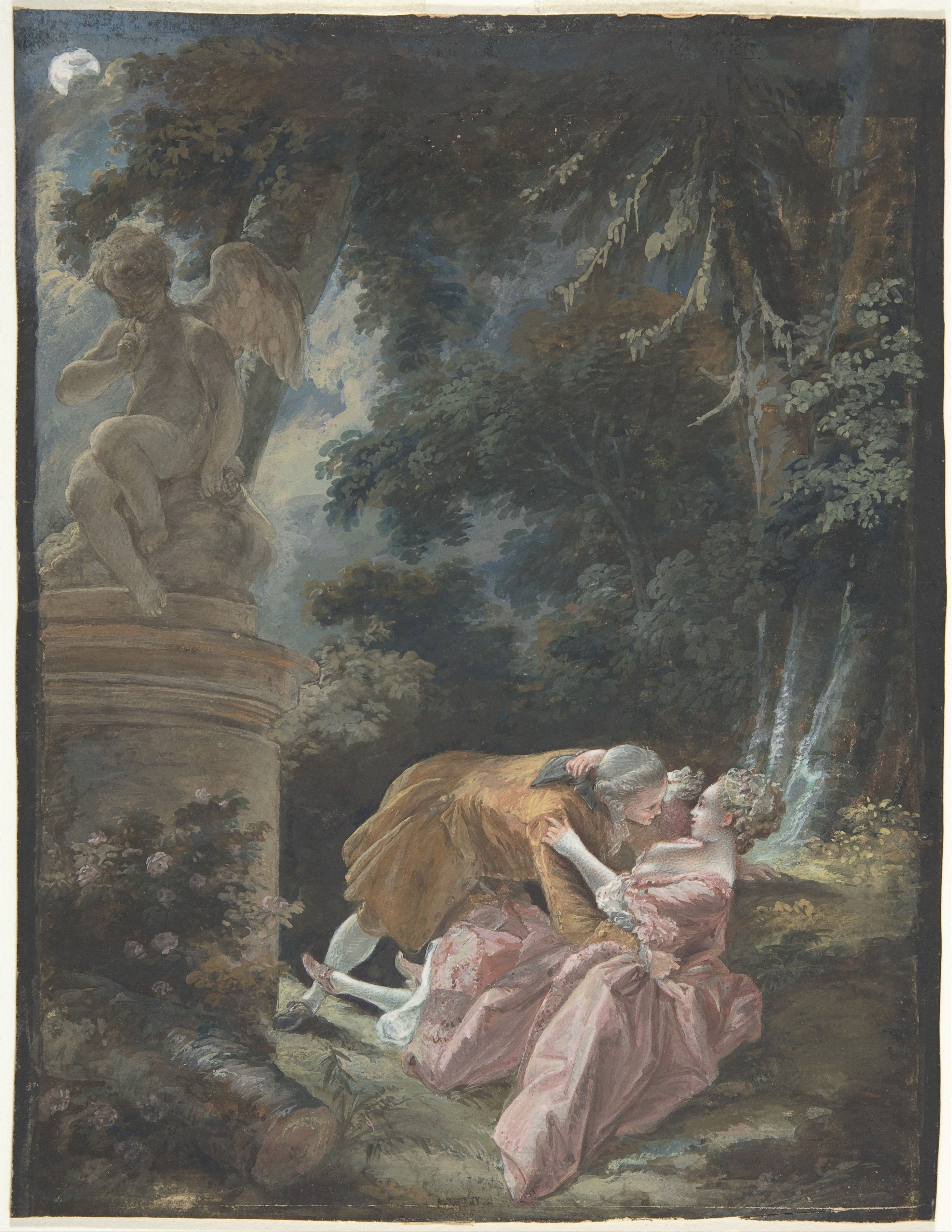 Drawing; Drawings